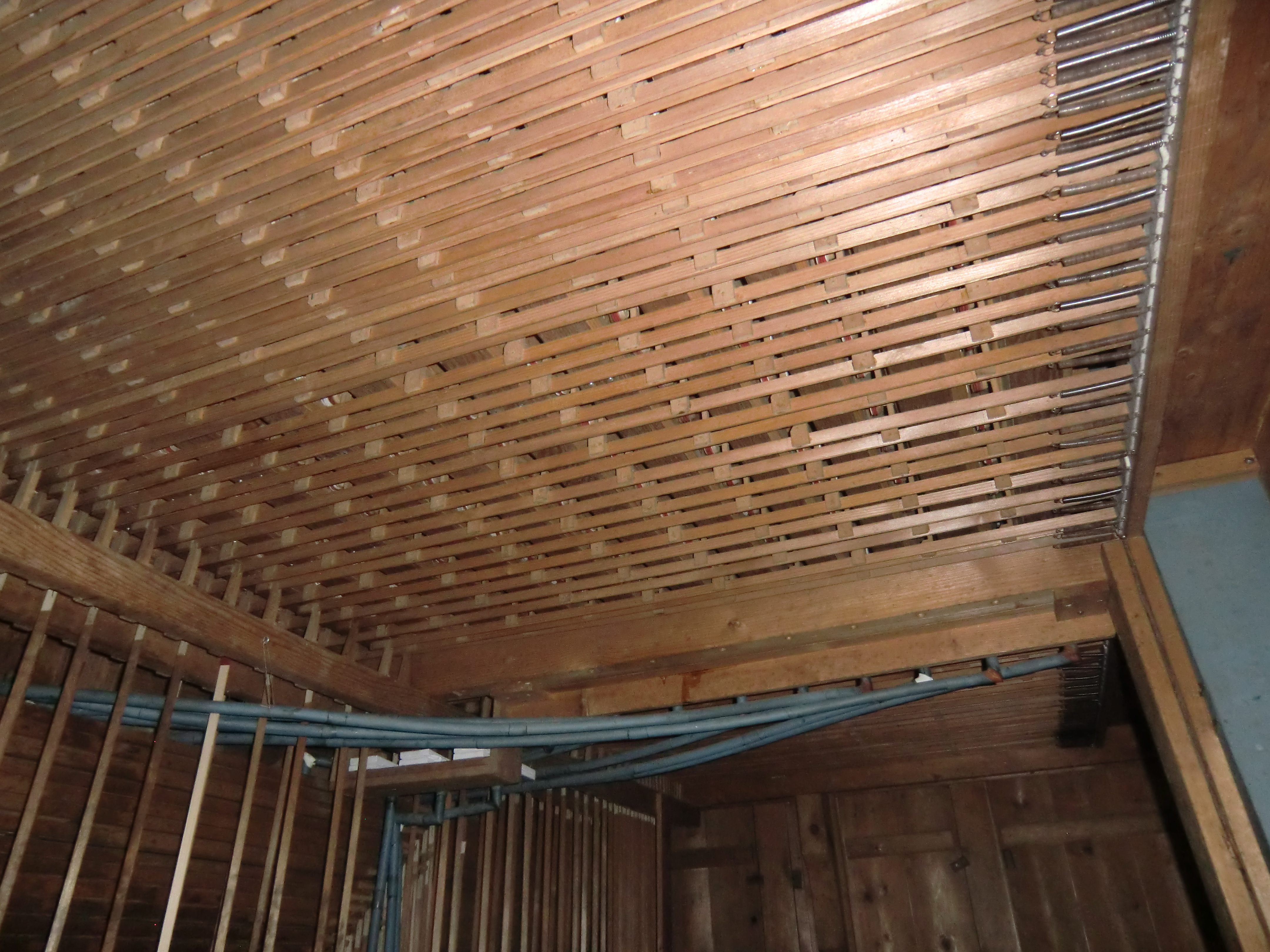 Keller-Orgel Kransberg (1876) - mechanische Hängeventillade (Trakturführung unter der Windlade für Haupt- und Nebenwerk)